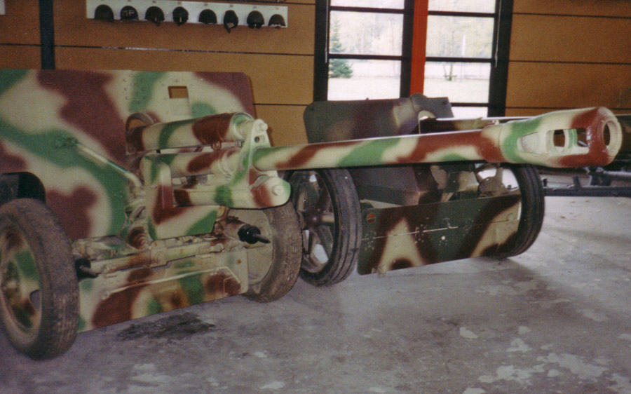 Russische 7,62 cm Feldkanone M42 L 42-ZIS-3 - wegen dem auffälligen Abschussgeräusch umgangssprachlich als Ratsch Bumm bezeichnet